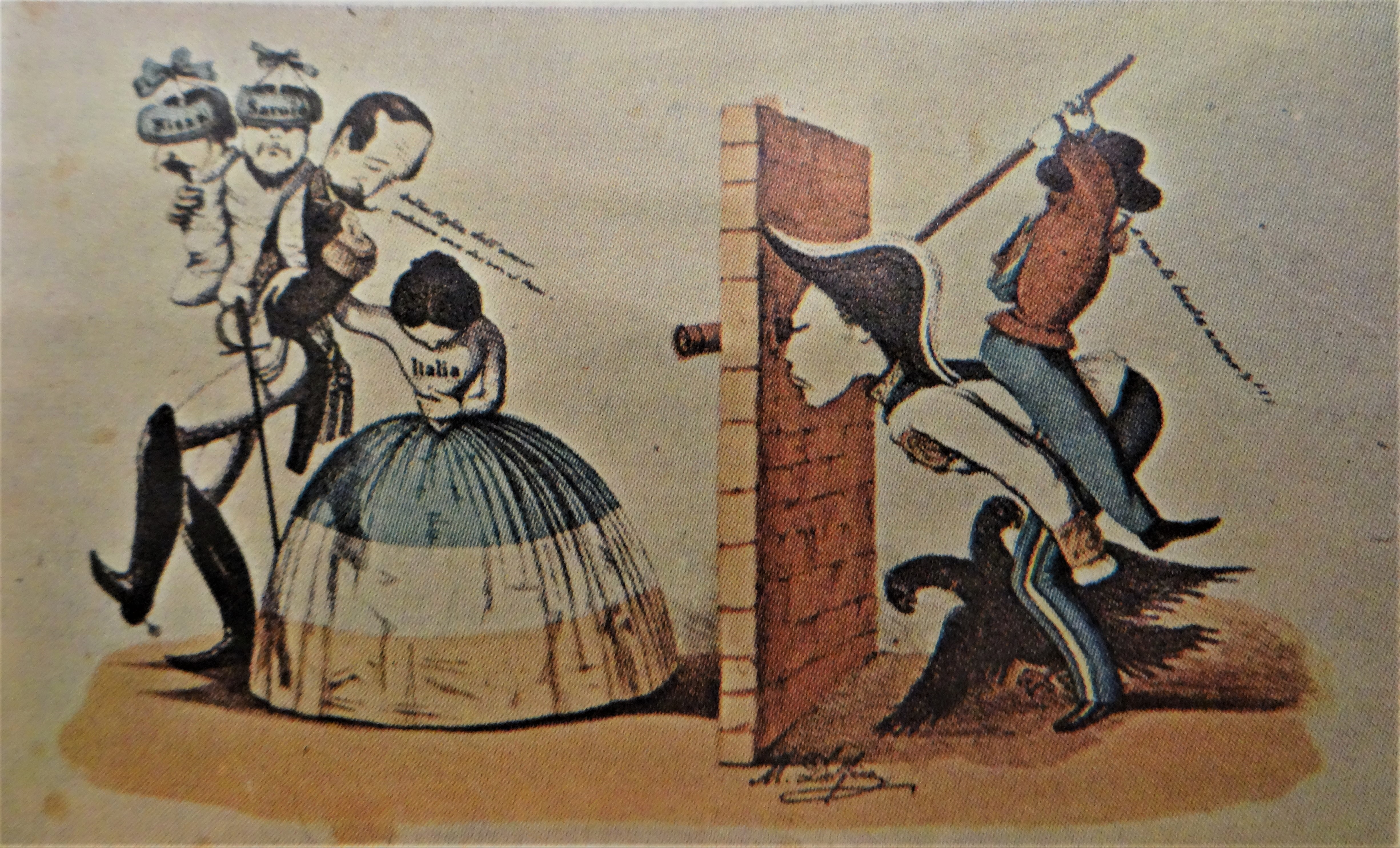 Vignetta satirica apparsa all'indomani della sofferta cessione di Nizza e Savoia alla Francia da parte del Piemonte, a seguito della Seconda Guerra d'Indipendenza italiana. Raffigura l'Italia con l'aspetto di una donna afflitta, e le due regioni come suoi figli che l'imperatore francese Napoleone III le ha appena sottratto. Sulla destra l'imperatore austriaco Francesco Giuseppe assiste di nascosto alla scena mentre viene bastonato da Garibaldi.